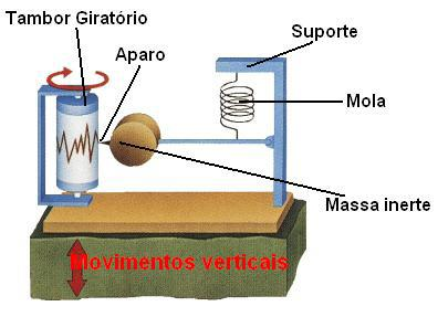 Autor: José Rebelo Baseado em Descobrir Ciências